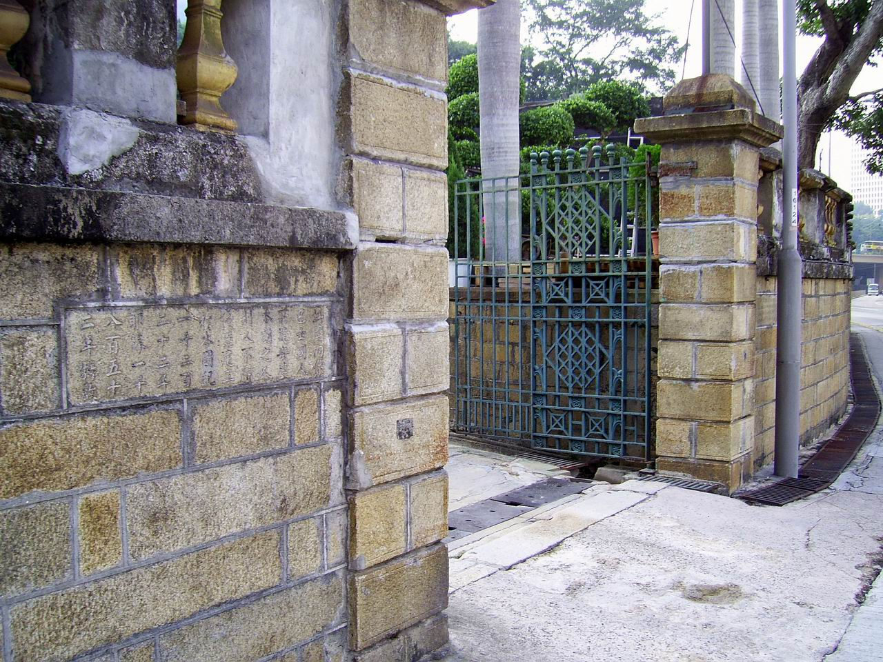 中文（香港）: 祆教墳場標示